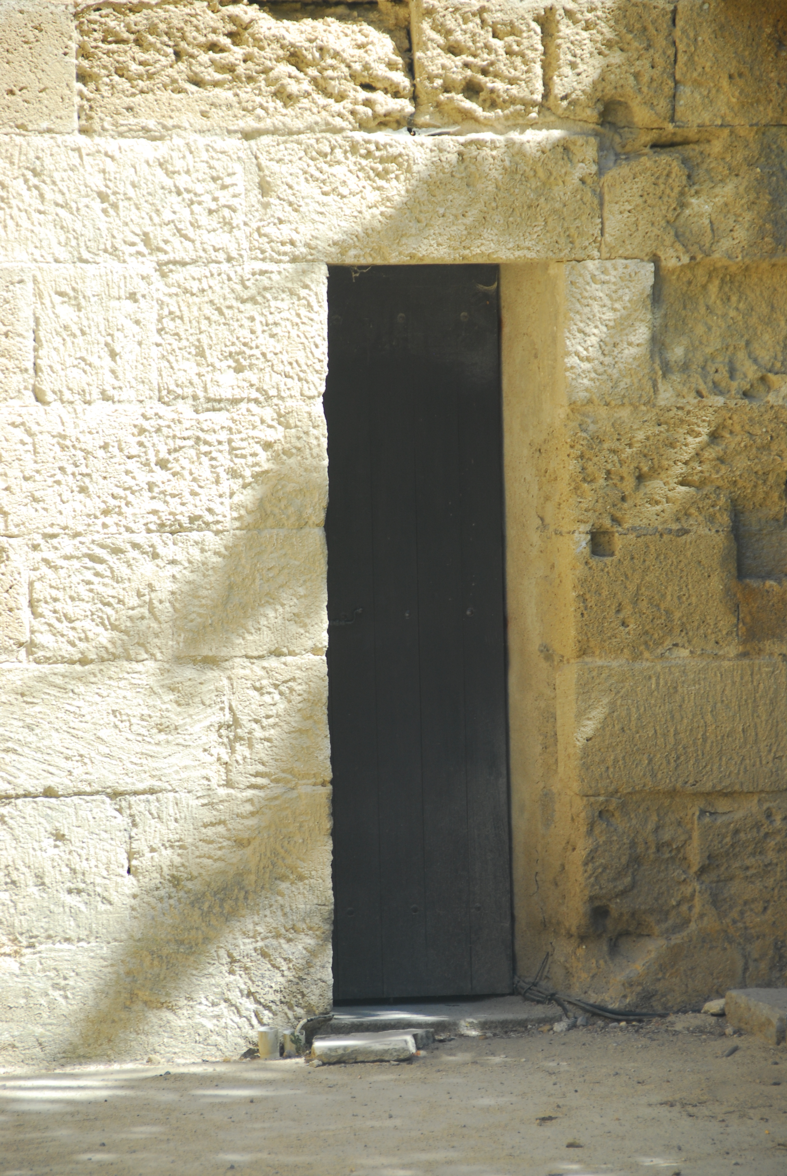 St-Pierre-et-St-Paul de Maguelone, Tür zwischen ehem. St-Jean-Turm und Schiff